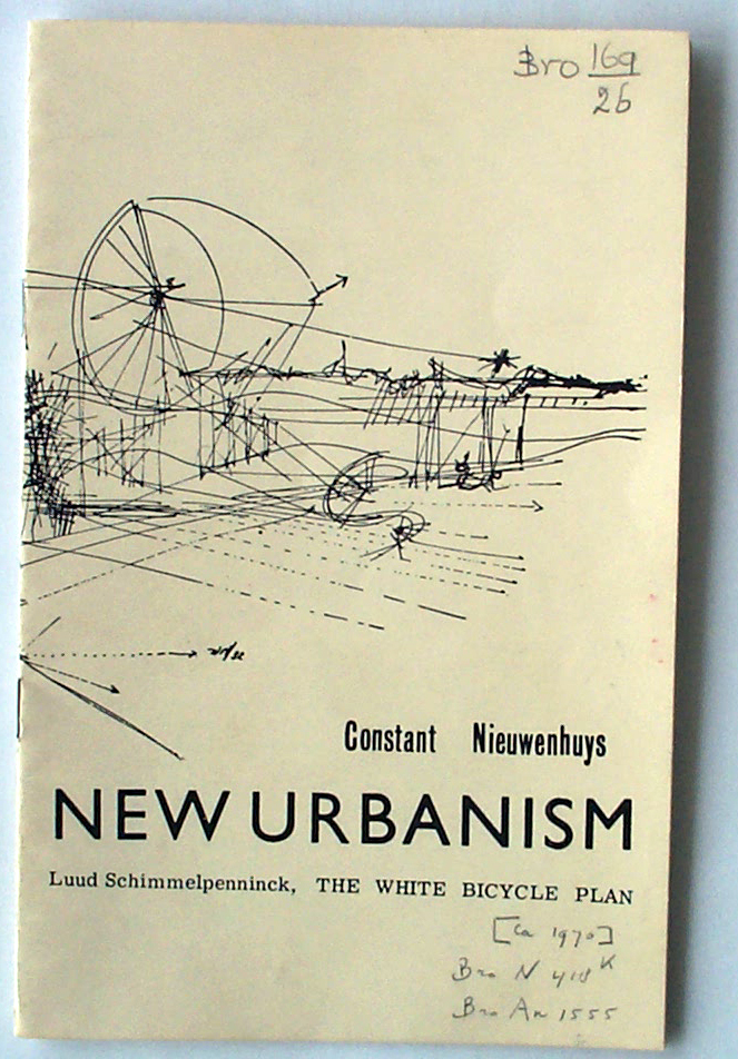 Dutch Provo document